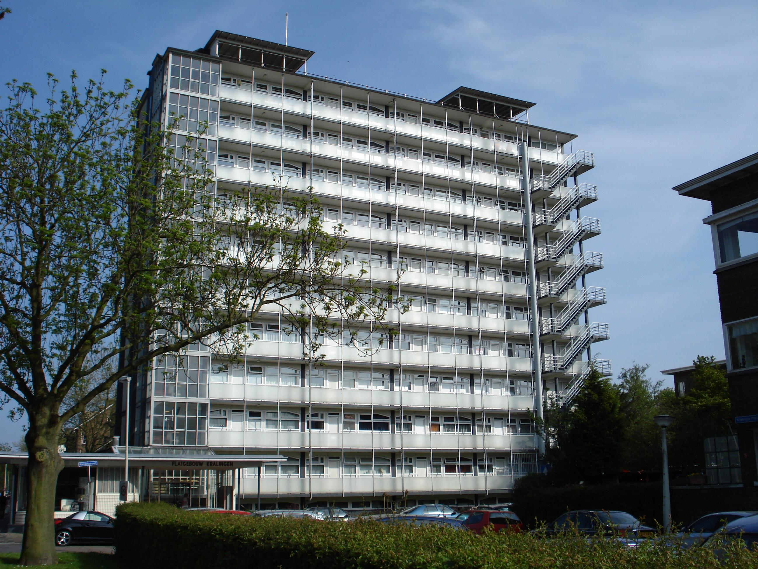 Rotterdam, Galerijflat Kralingse Plaslaan. Rijksmonument.